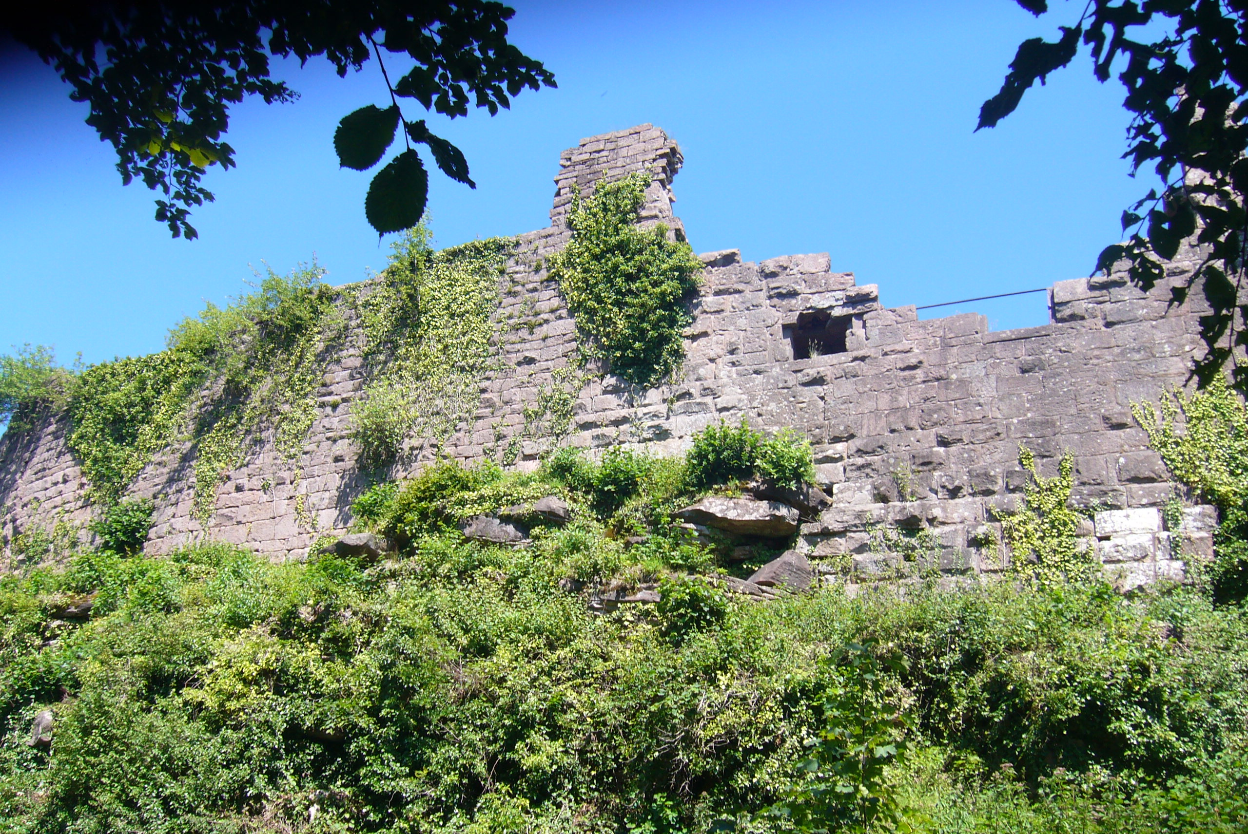 Château du Frankenbourg 016.JPG